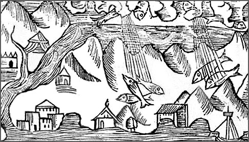 Pluie de poissons, gravure d'O. Magnus, 1555 1555 engraving of rain of fish